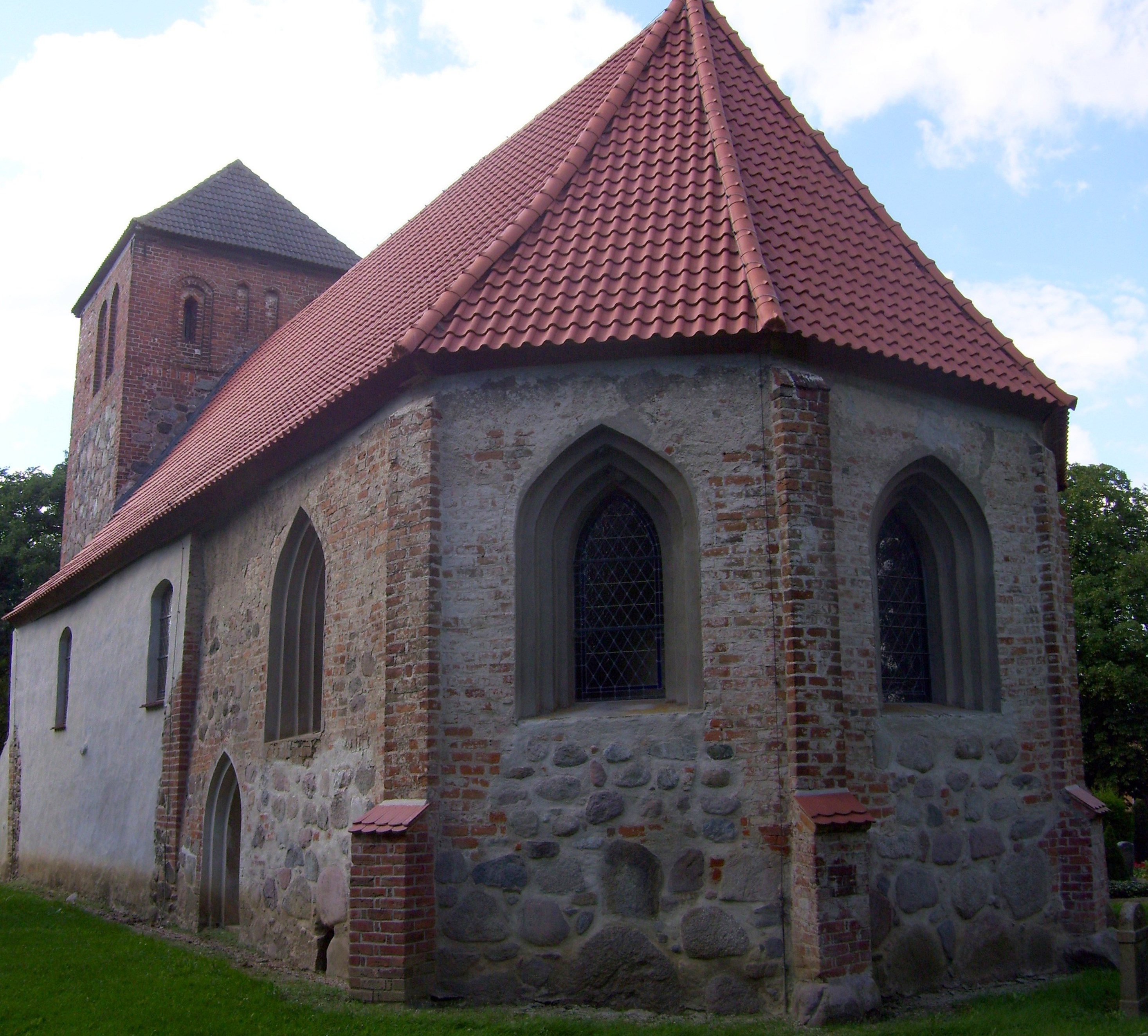 Kirche in Beggerow, Landkreis Demmin, Chor, Nordostseite